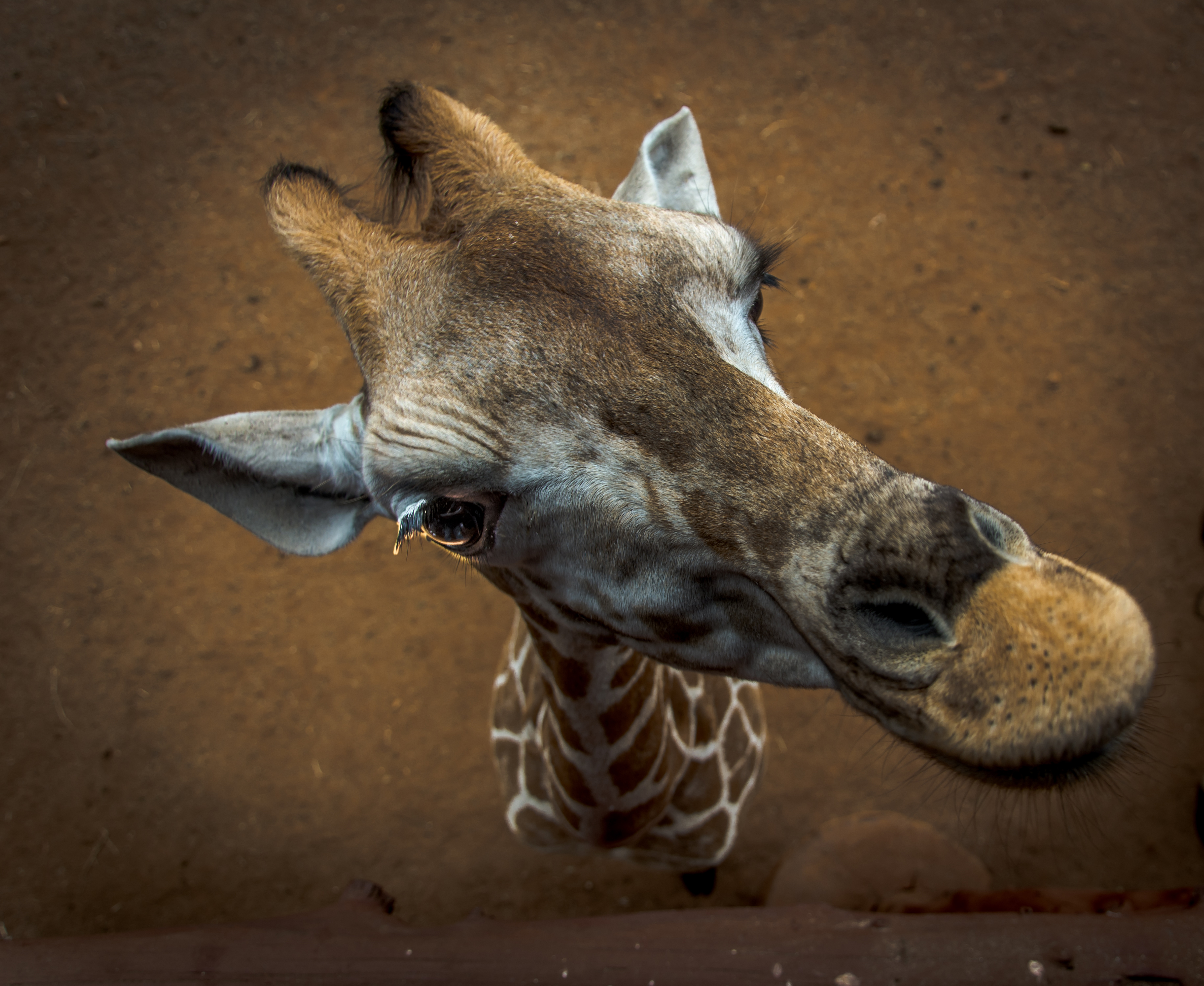 احدى الزرافات فى ملجا الفيلة الايتام بنيروبى